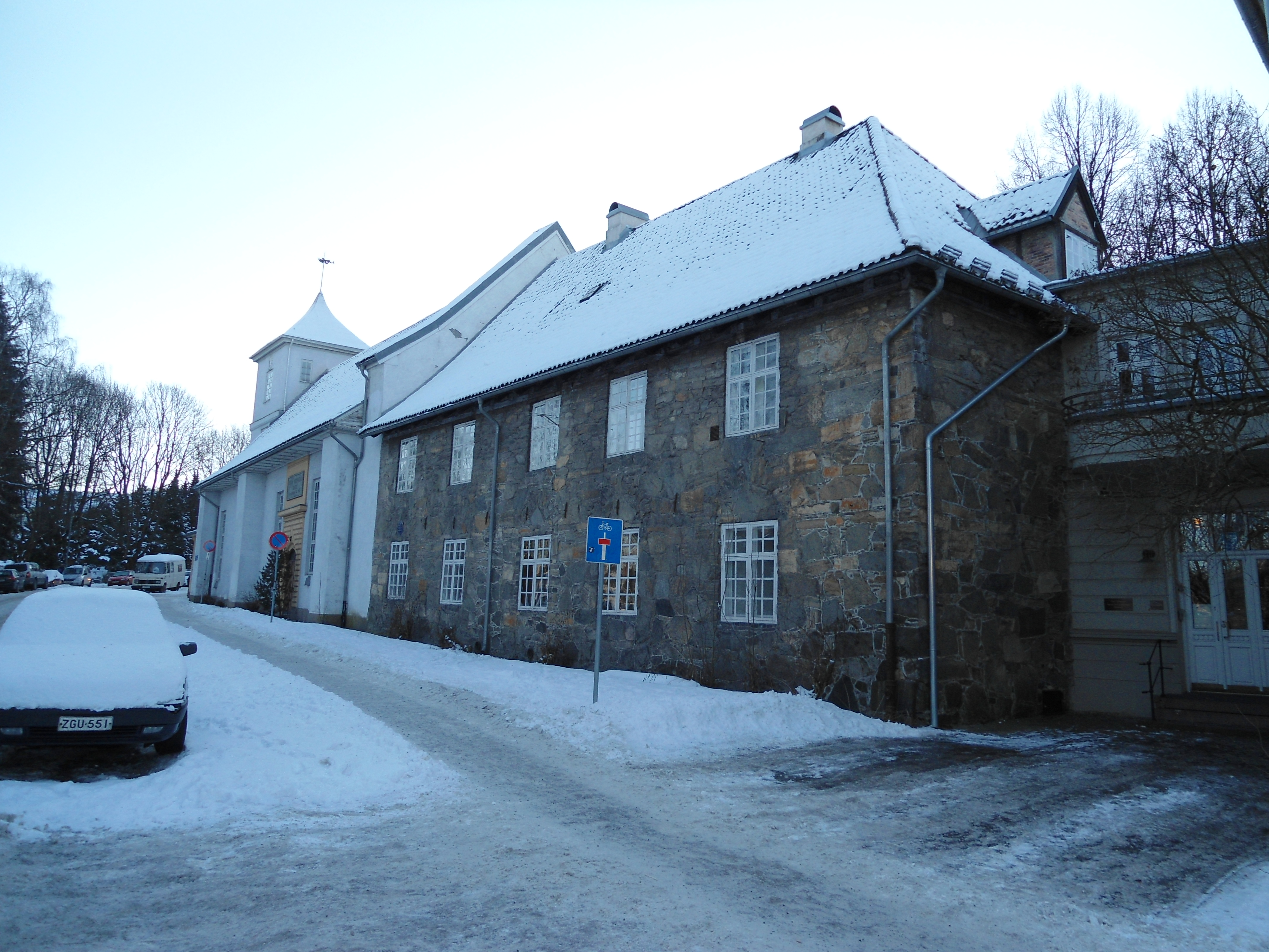 Hospitaalkerk uit 1796 met daar achter het voormalige klooster uit 1734 in de wijk Gamlebyen